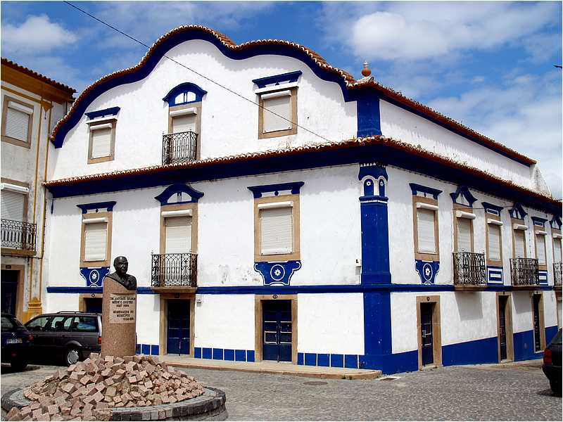 Nisa: la maison bleue